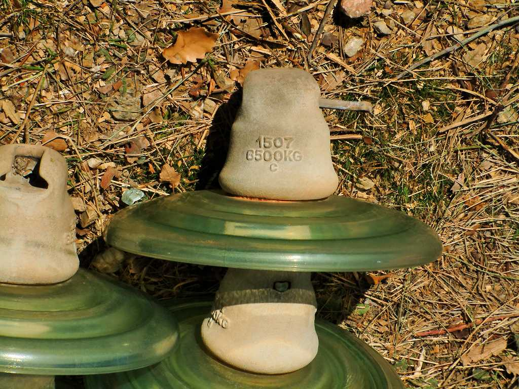 Detalle aisladores de cristal (Alta tensión) Cámara: FinePix 6900Z ISO: 100 Tv: 1/160 Av: 8